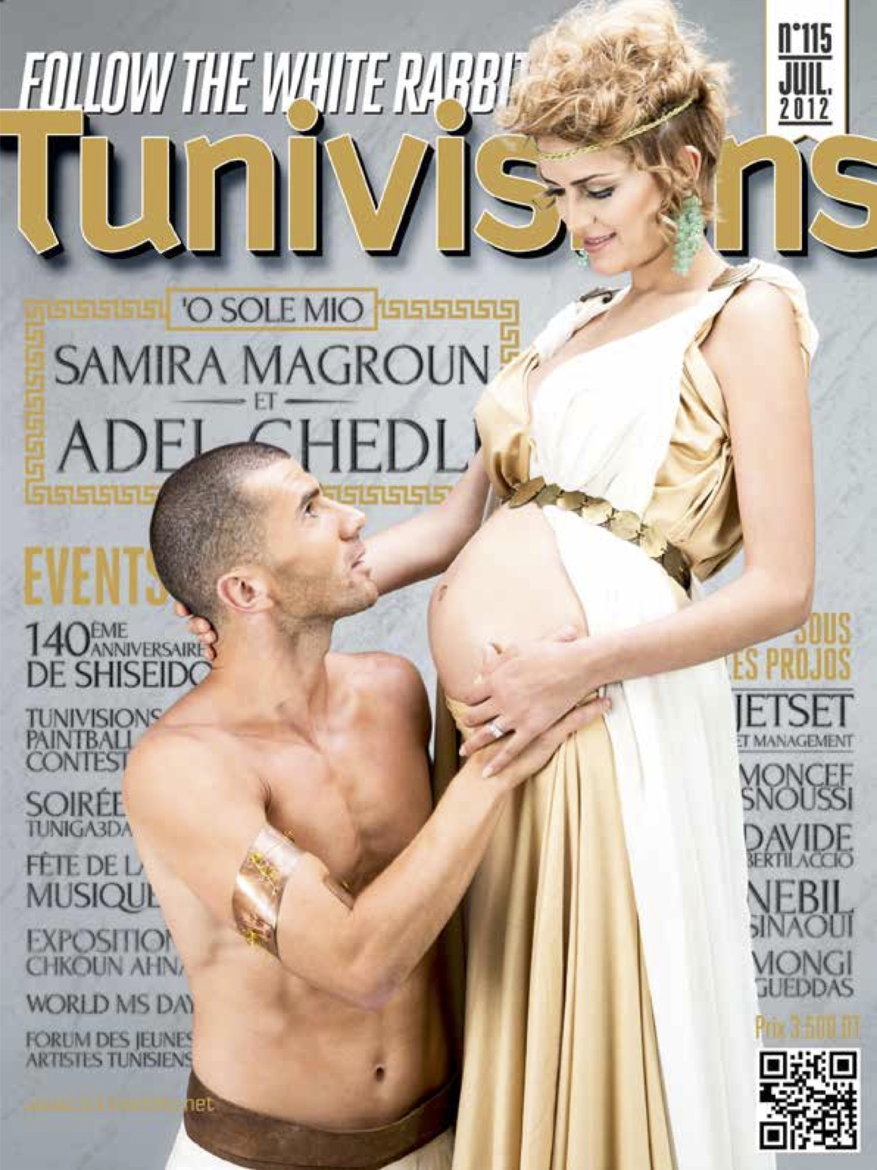 Couverture du numéro 115 du magazine tunisien Tunivisions.